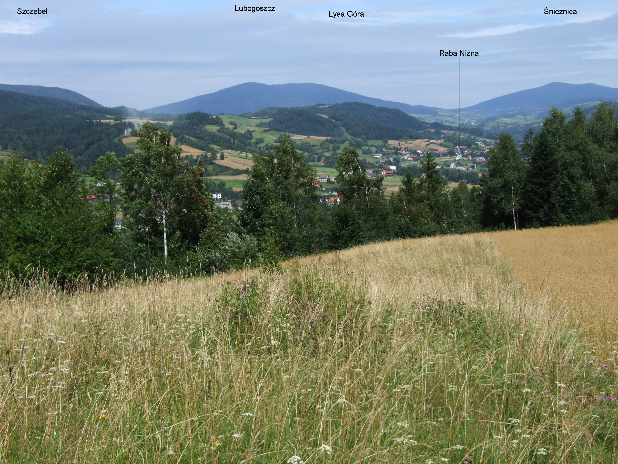 Widok ze stoków Grzebienia